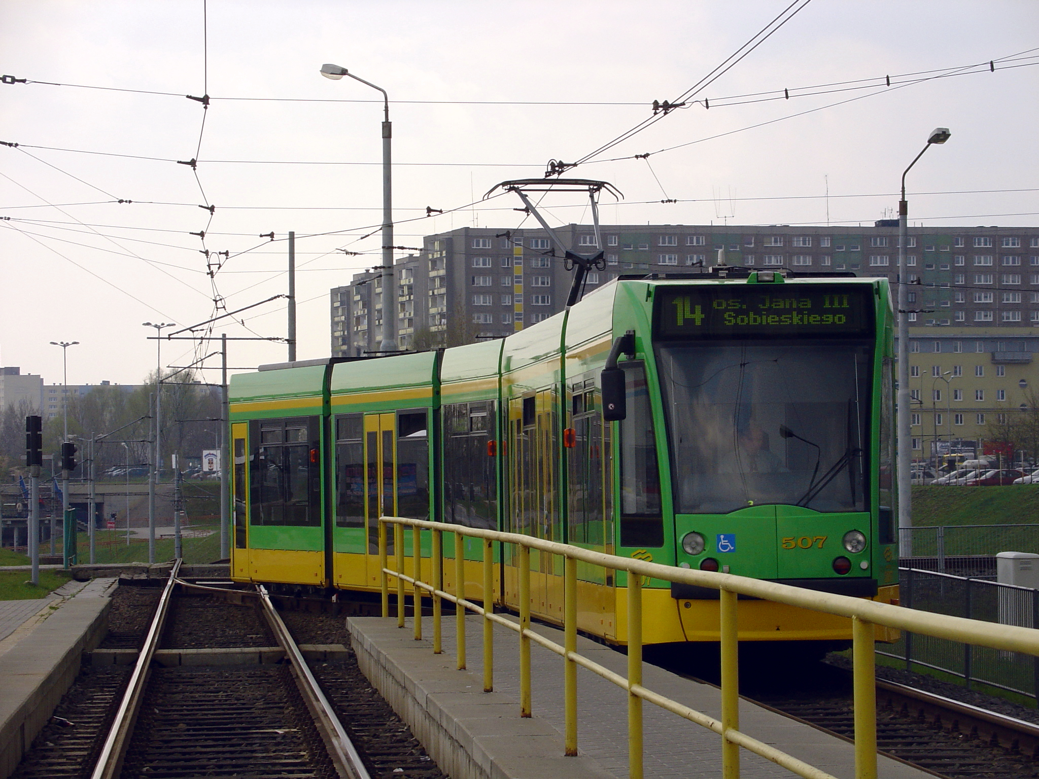 Combino wjeżdża na pętlę Sobieskiego (Combino arriving at the Sobieskiego terminus)